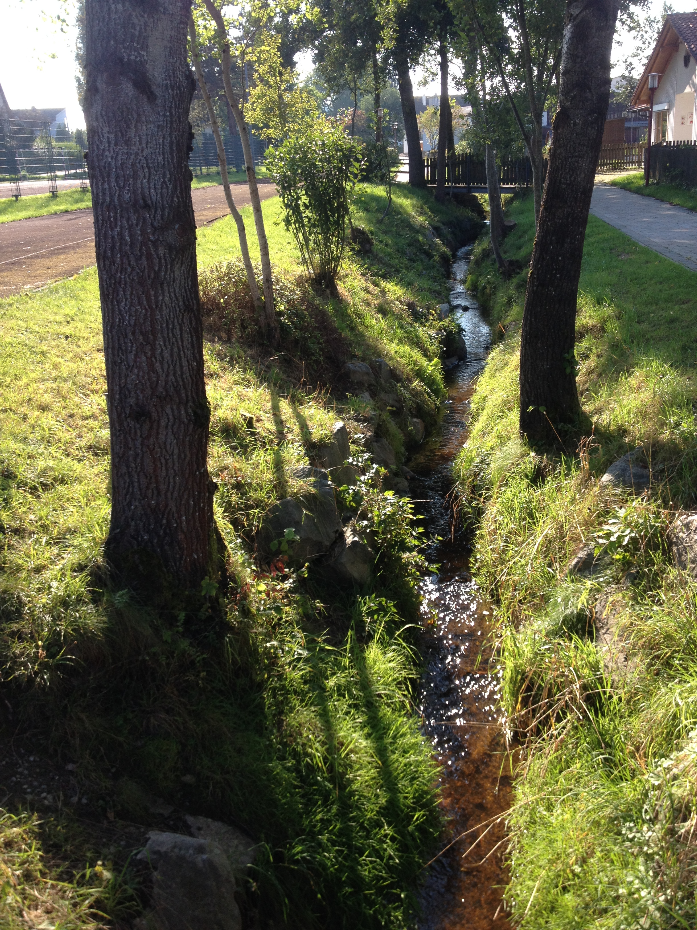 Der Burraubach in Wald (Blickrichtung bachaufwärts).